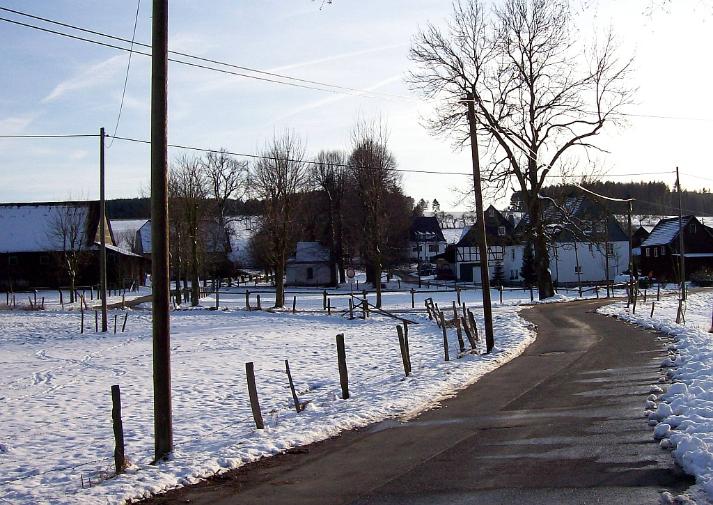 Schmallenberg-Oberberndorf (Germany)